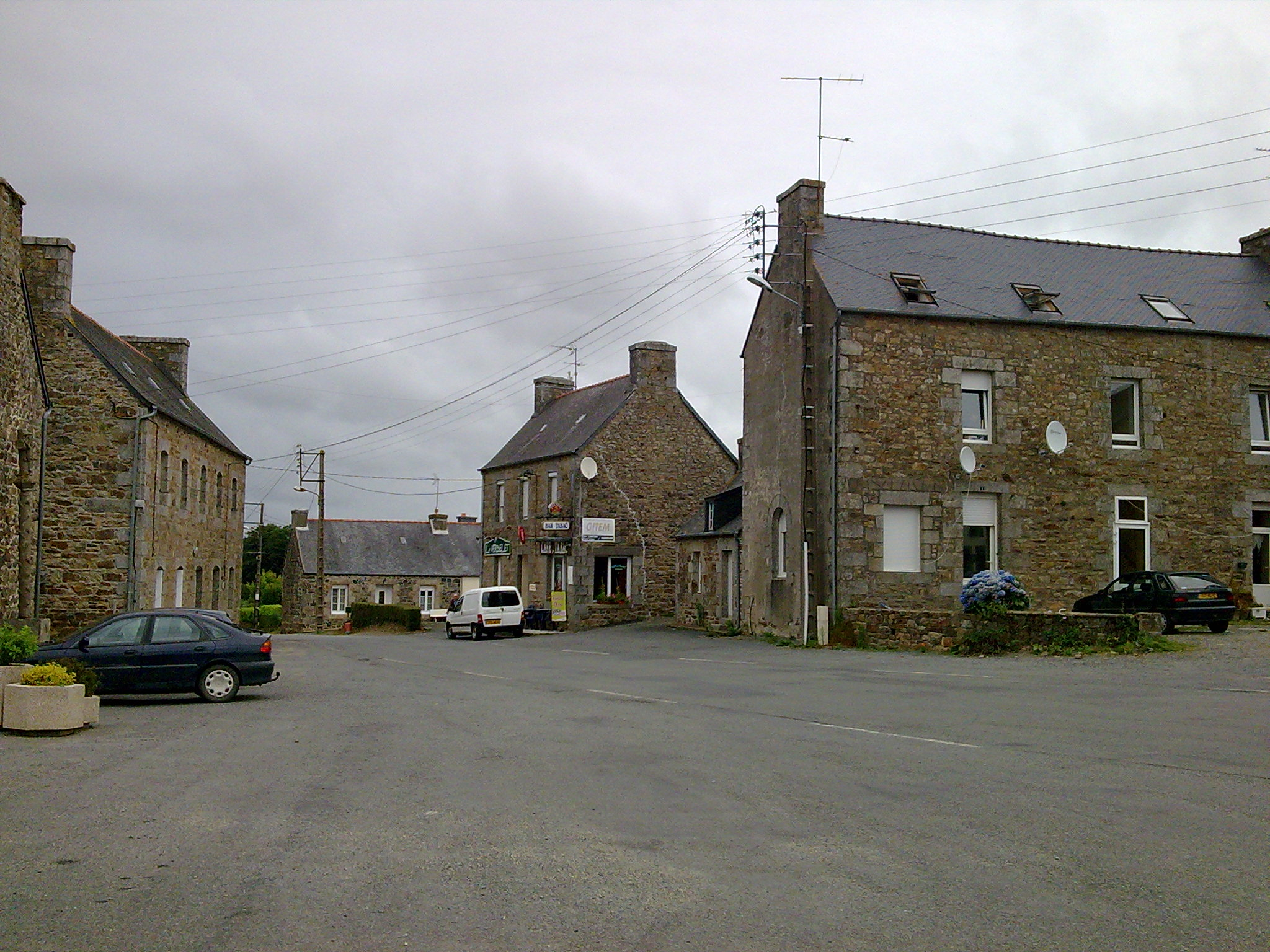 Tréglamus (Côtes-d'Armor)